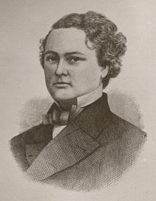 Louis-Siméon Morin